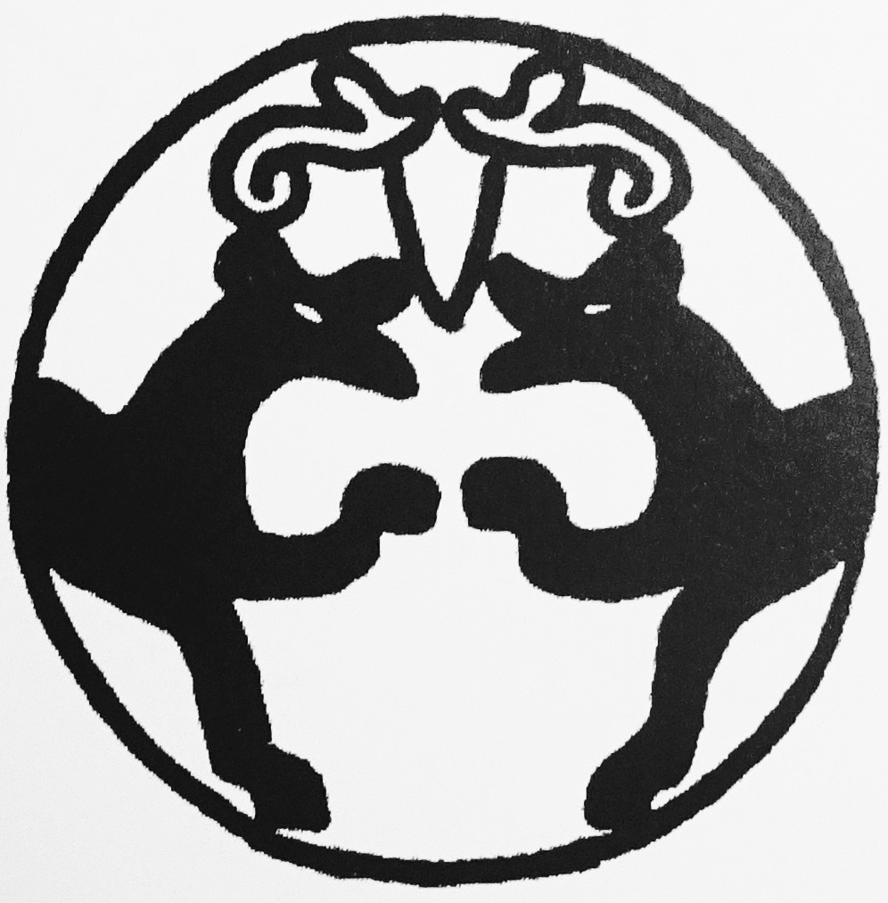 Huddinge hembygdsförenings emblem efter djurmotiv på runstenen Södermanlands runinskrifter 301 (även kallad Ågestastenen). Förlagan